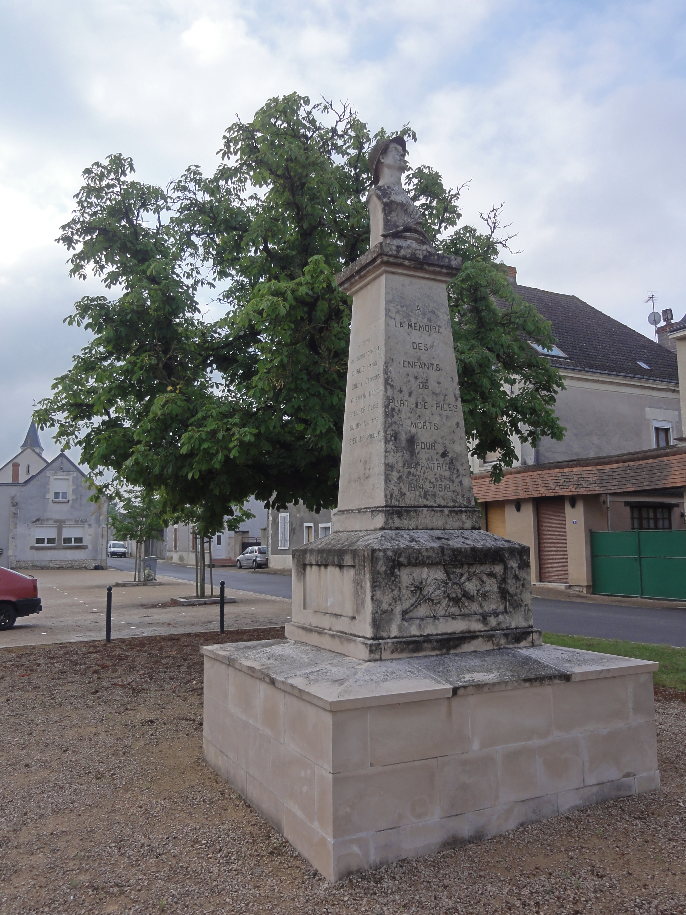 Port-de-Piles (Vienne) monument aux morts